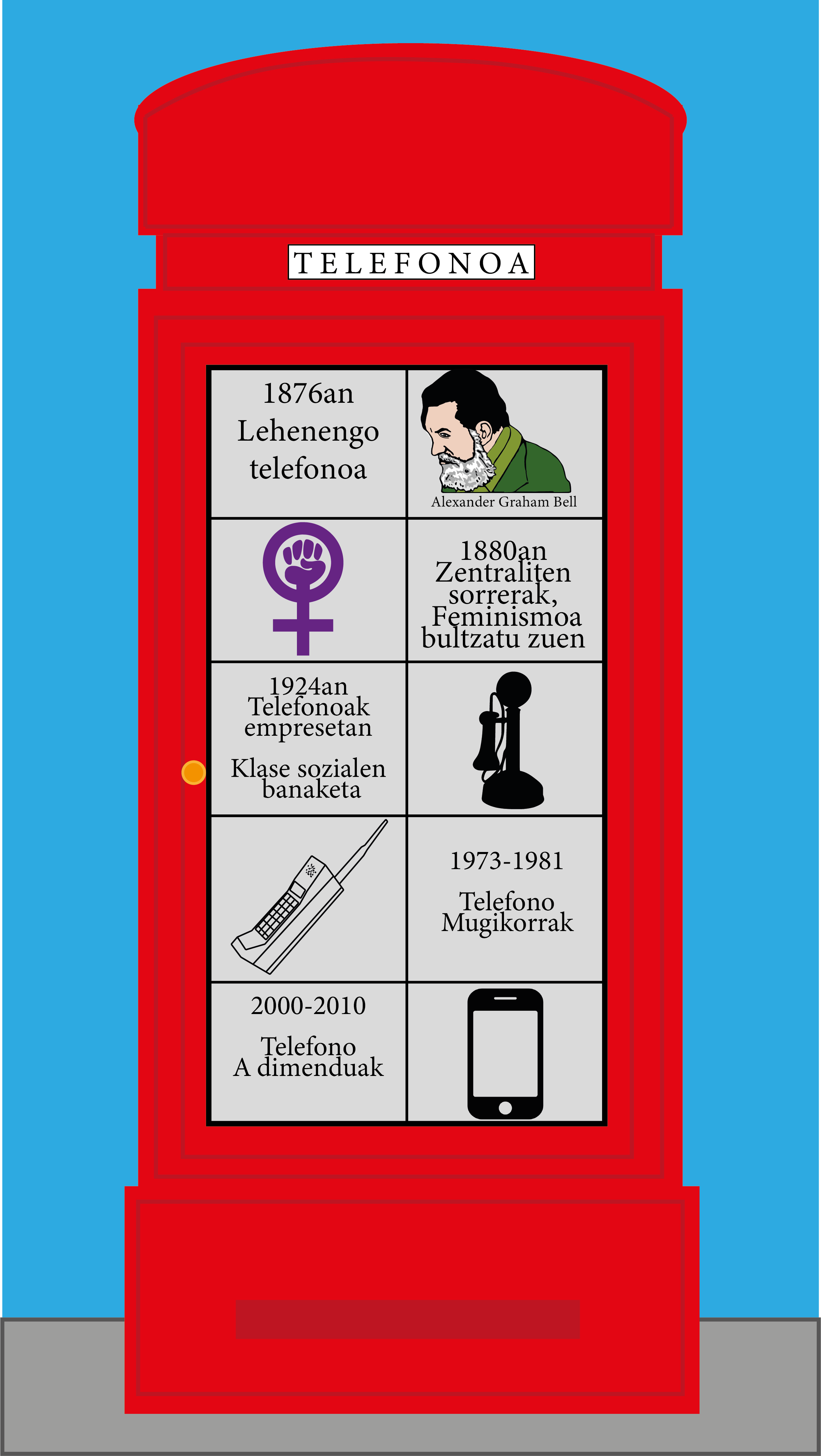 Telefono artikulu honentzako eginiko infografia